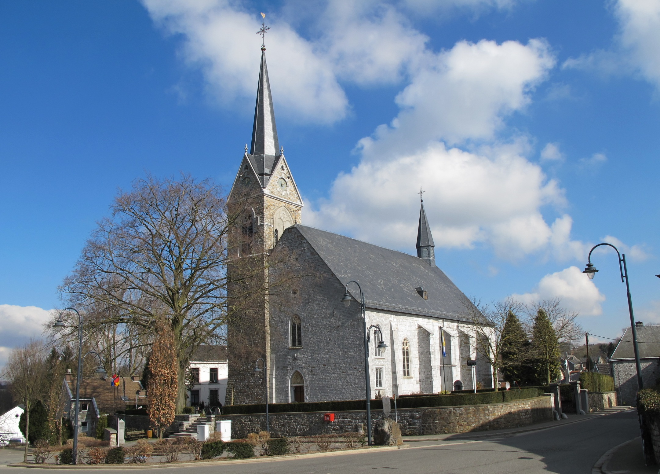 Kirche St. Stephanus Walhorn (Lontzen)